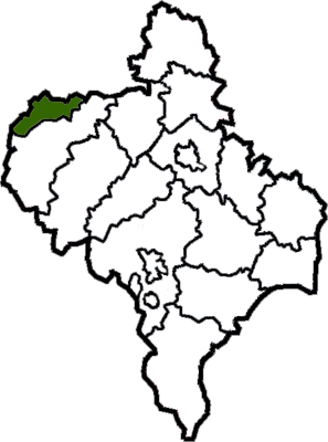 Bolehiv-Raion map